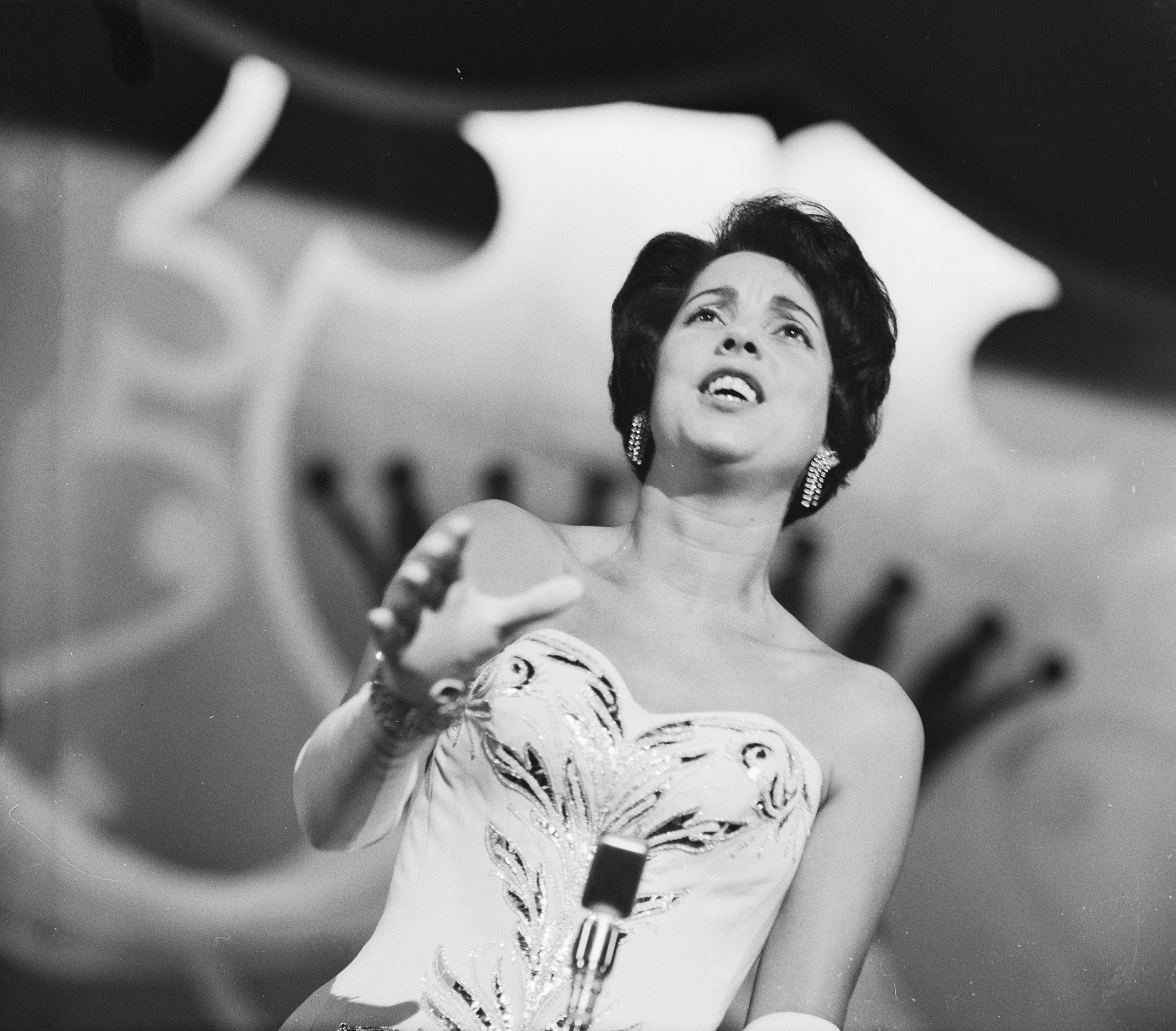 Corry Brokken in Sleeswijks Revue. Datum 5 juli 1961